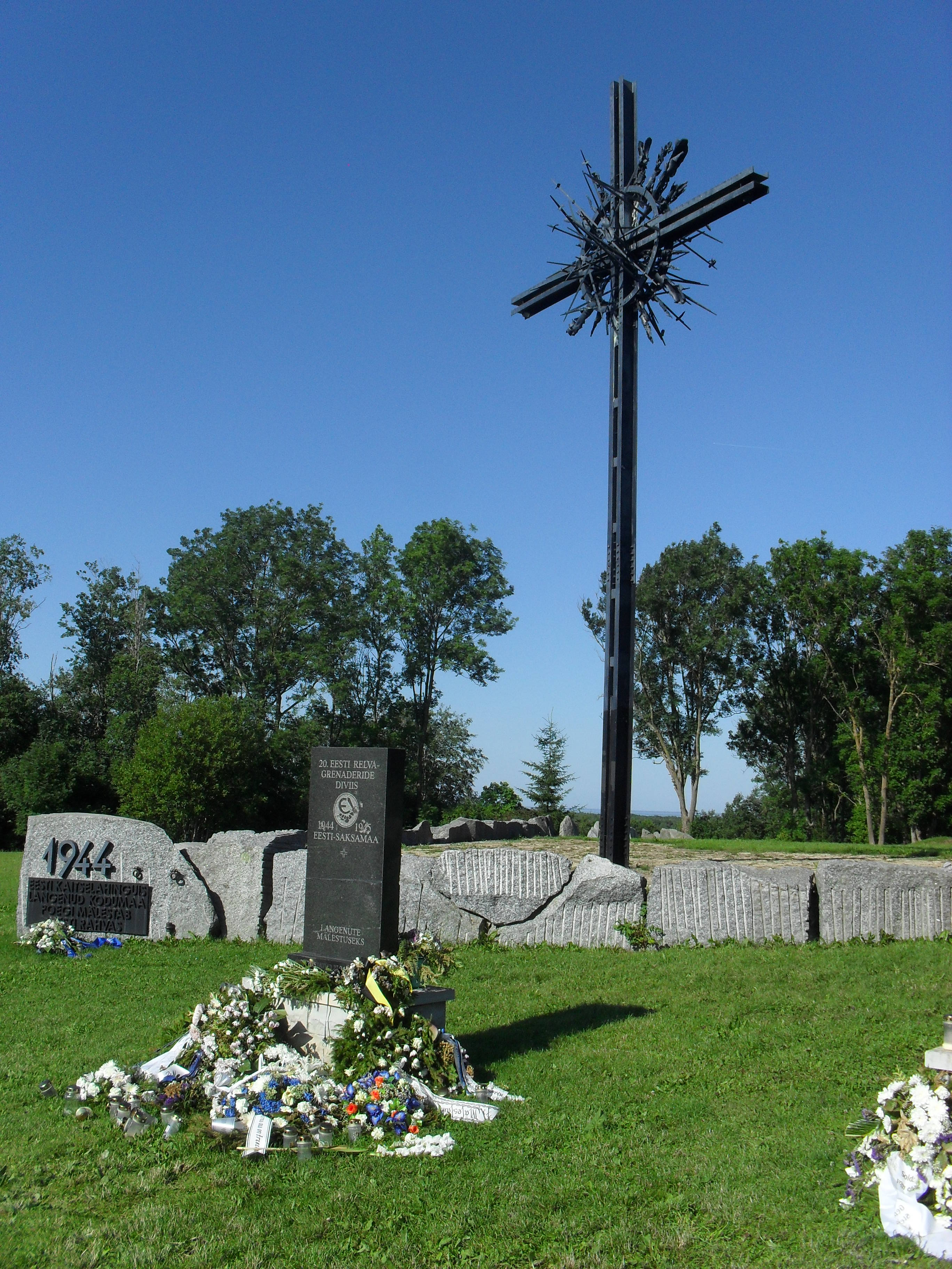 II maailmasõja Sinimägede lahingu koht